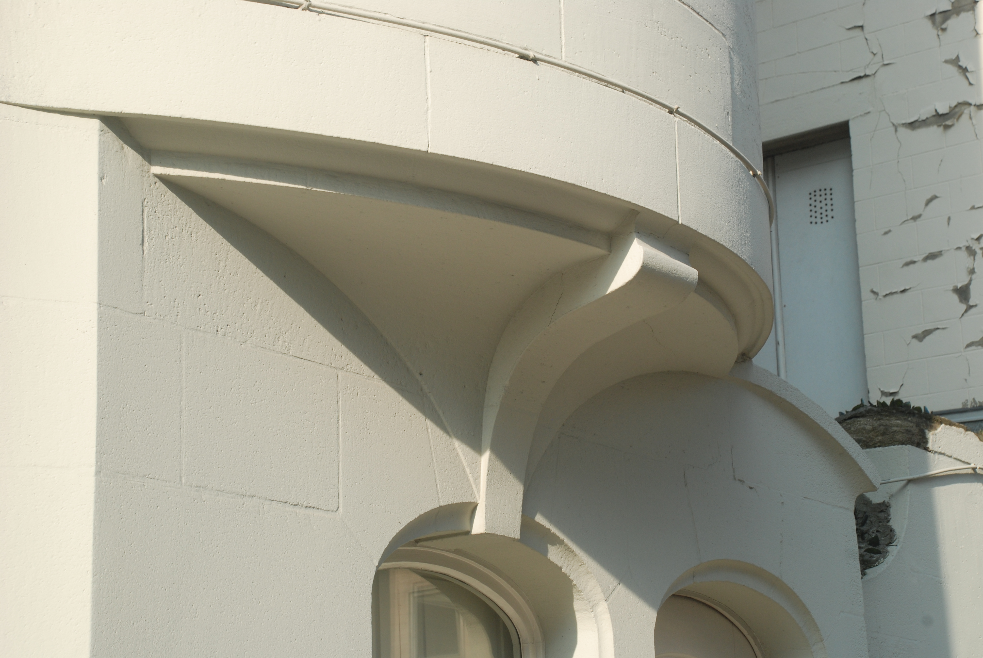 Belgique - Bruxelles - Maison Van Rysselberghe